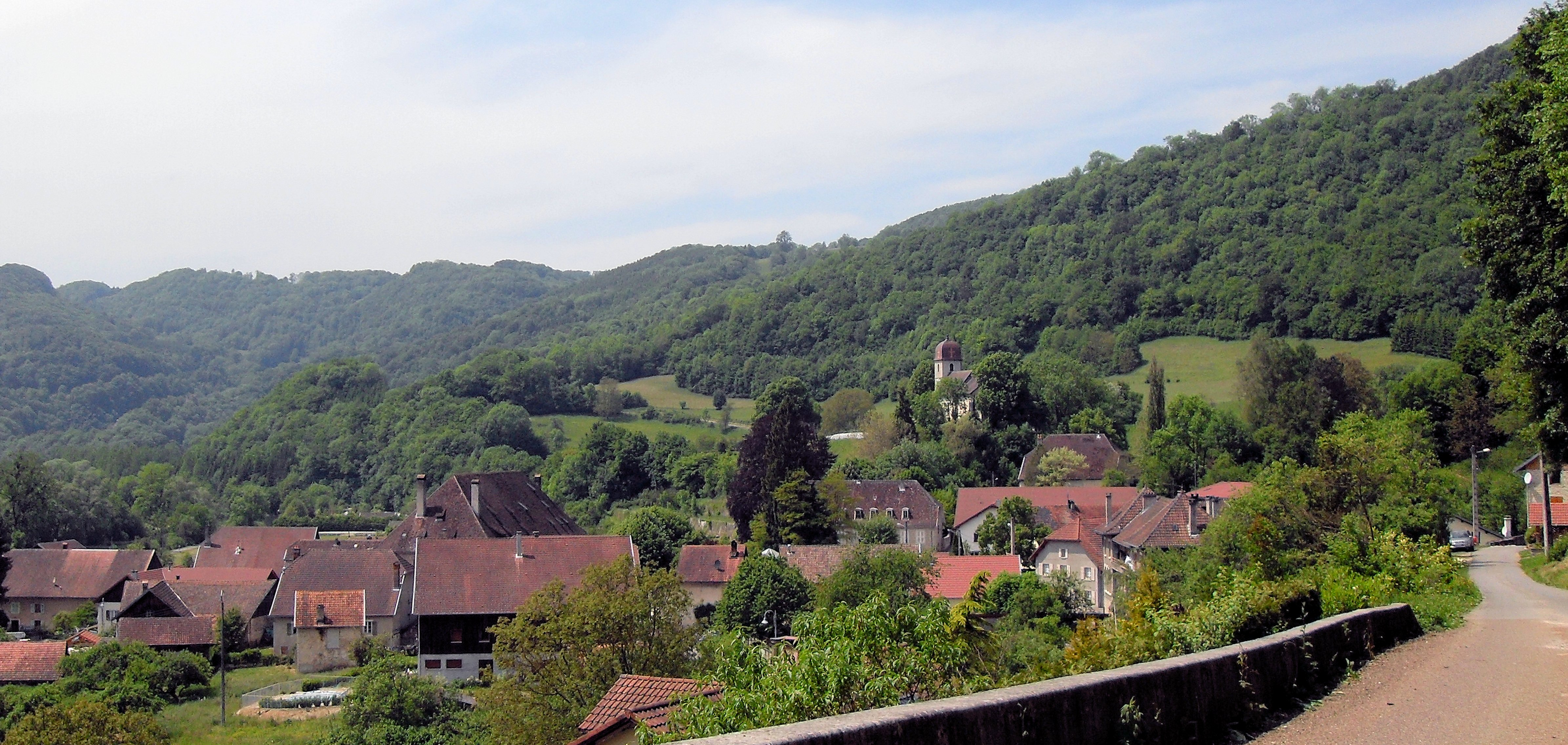 Vue sur Vaufrey